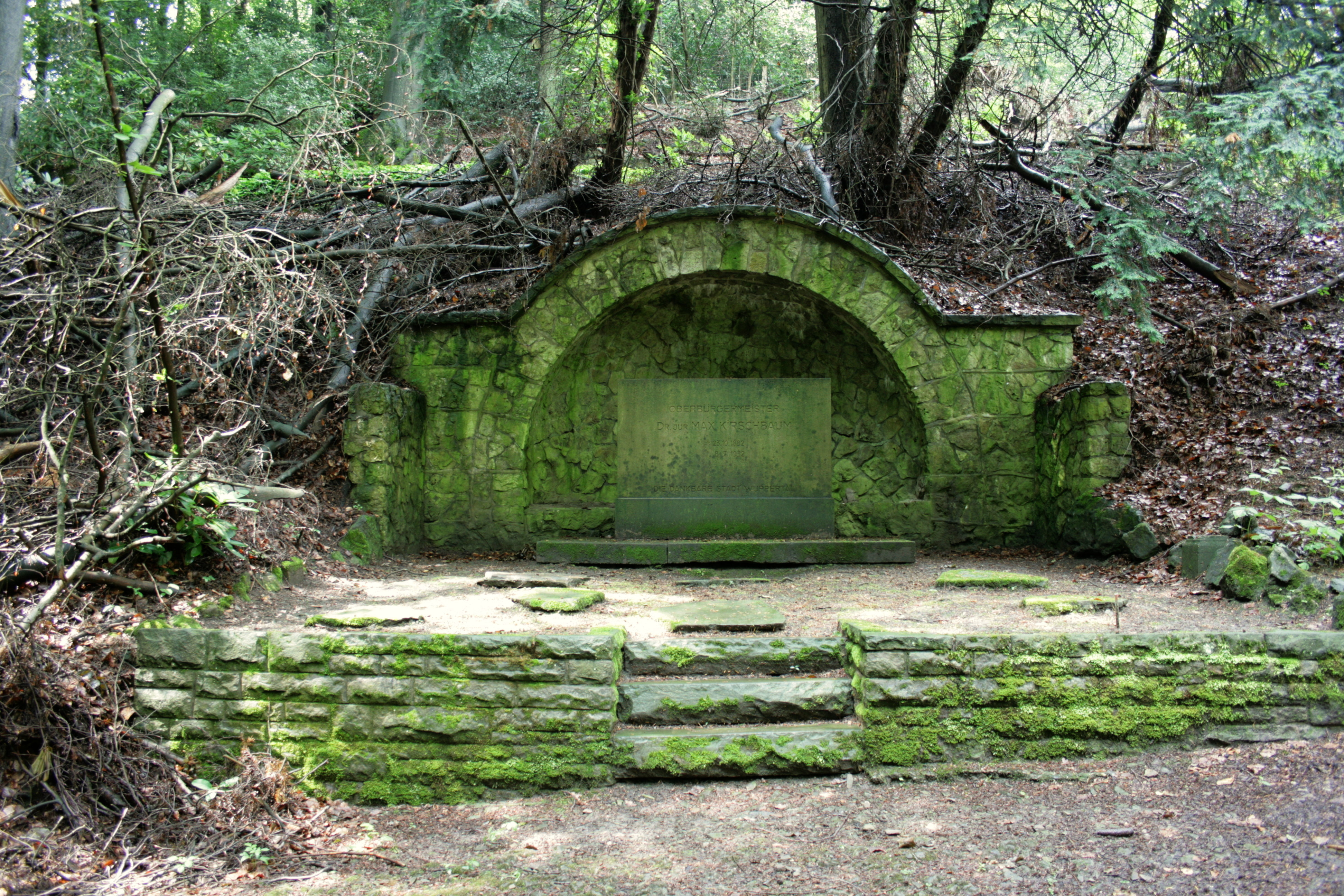 Waldfriedhof Krummacherstraße in Wuppertal